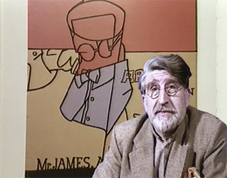 Portrait de Valerio Adami